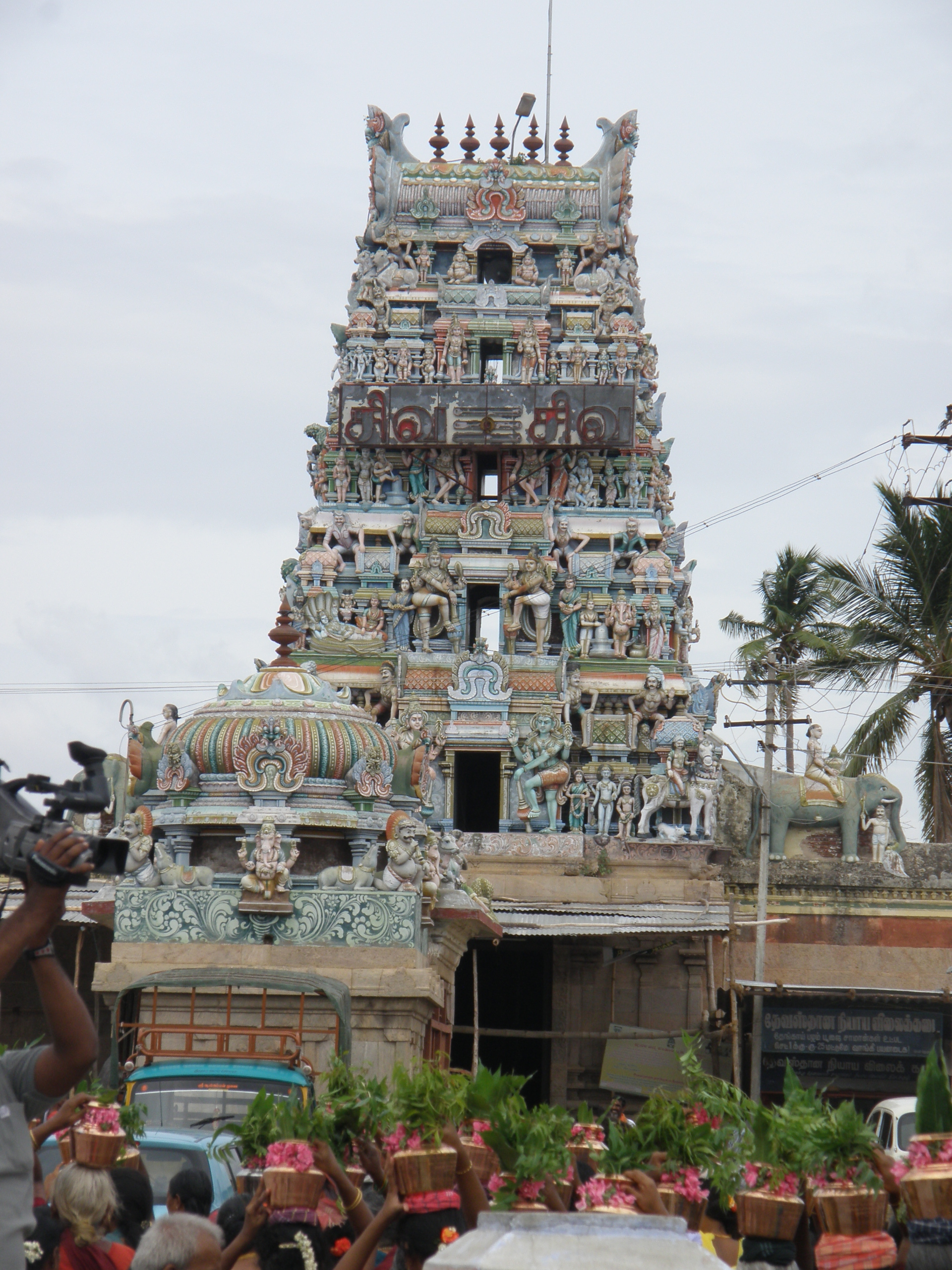 கொடுமுடி மகுடேஸ்வரர் கோவில்